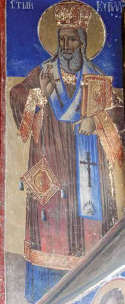 Тополчани, црква Вознесение Христово, св. Кирил, јужен ѕид